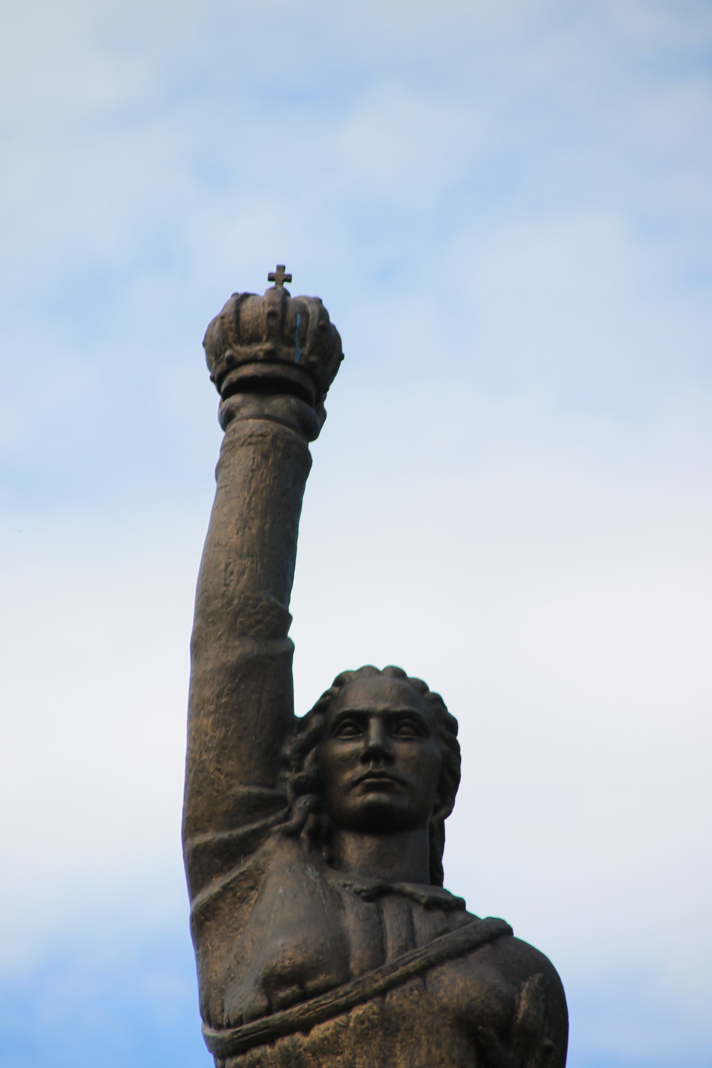 Spomenik palim Šumadincima